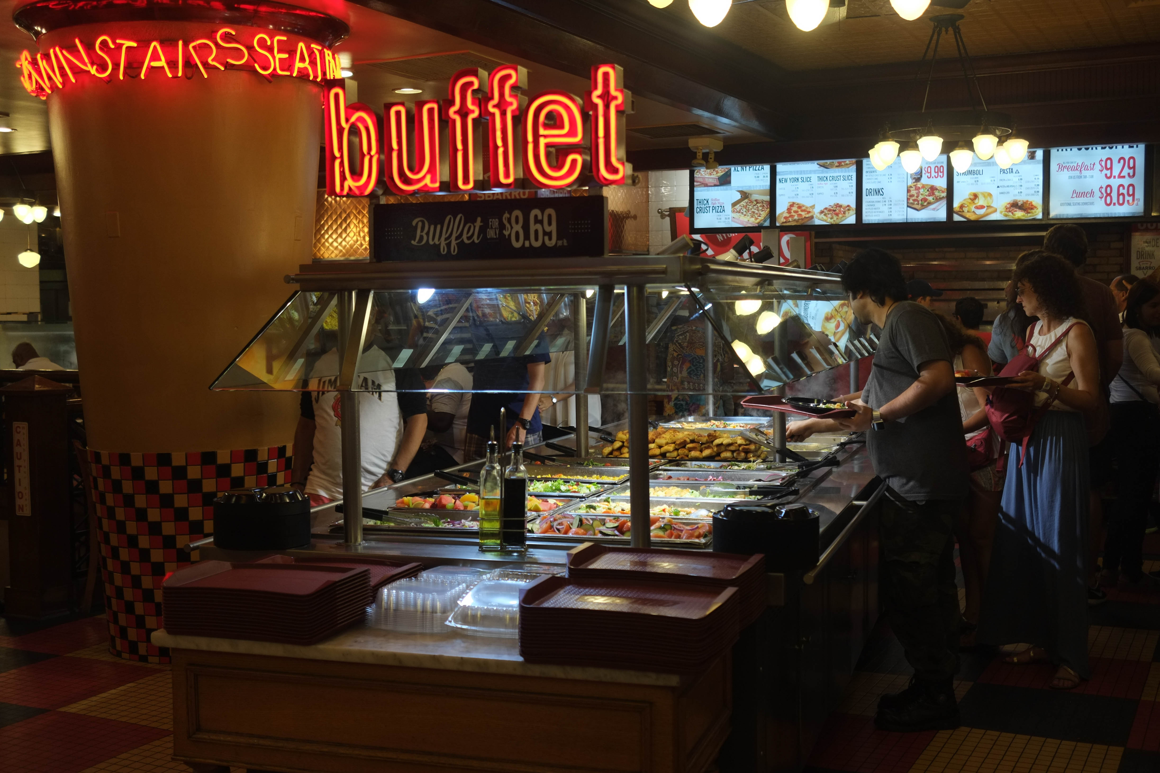 Buffet